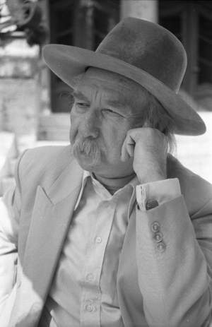 Határ Győző portréja (Budapest, 1990)